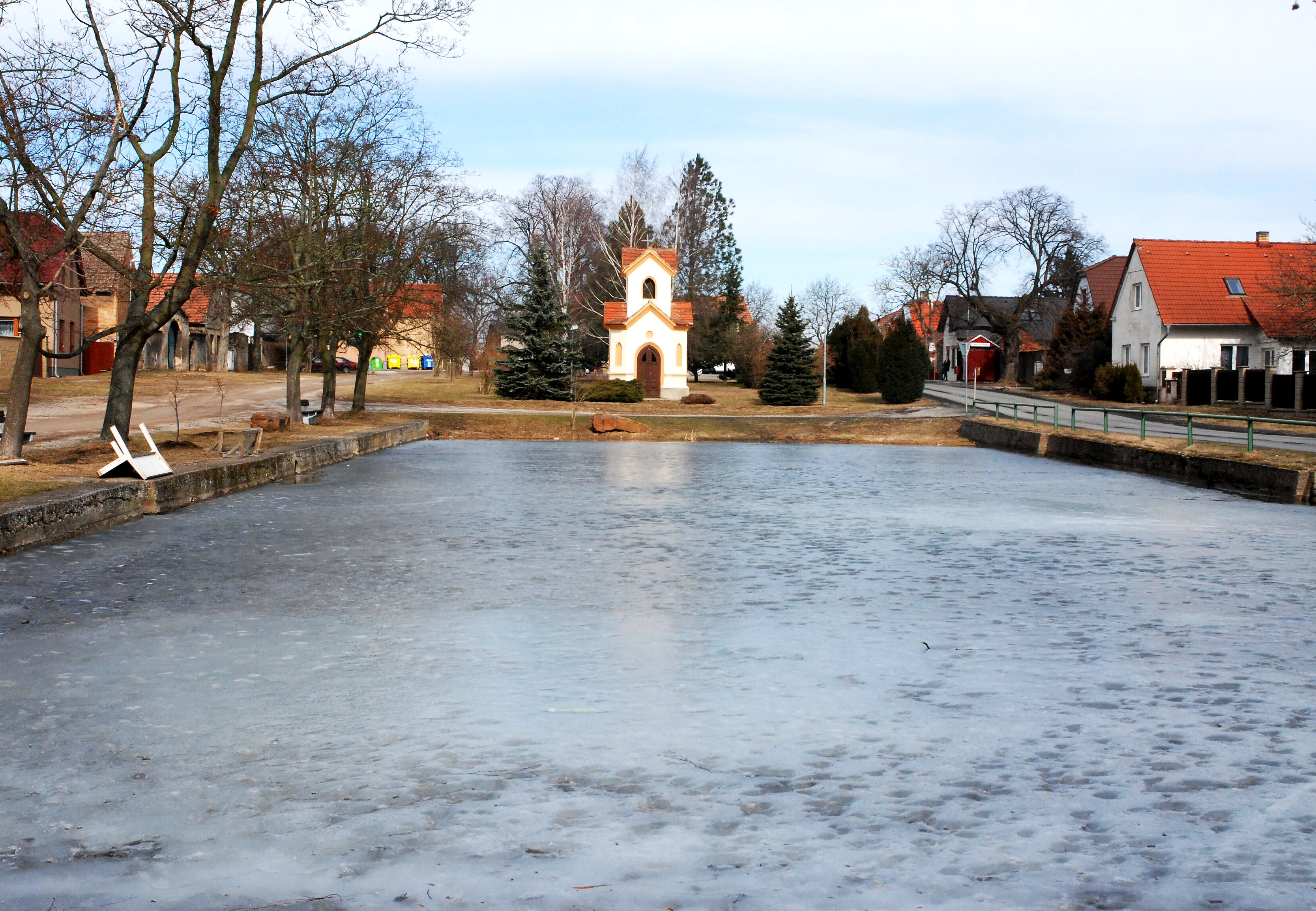 Vysoký Újezd, Tyršova náves